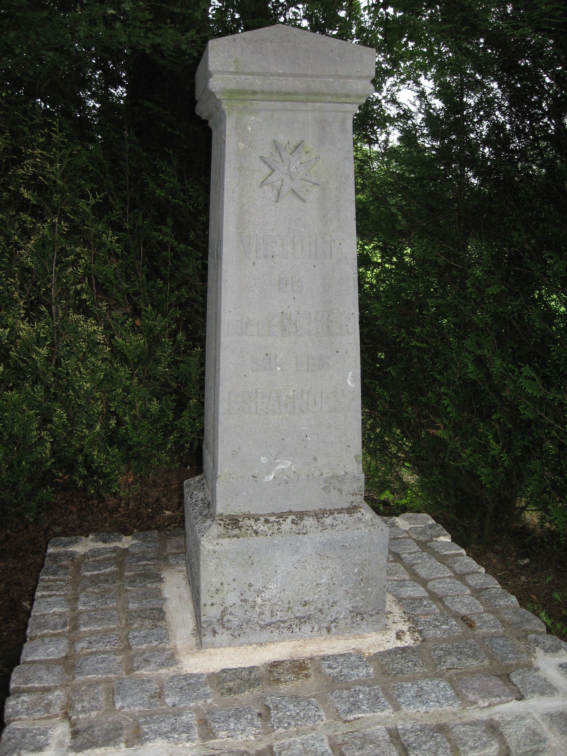 Stèle de la Bataille de Rocroi